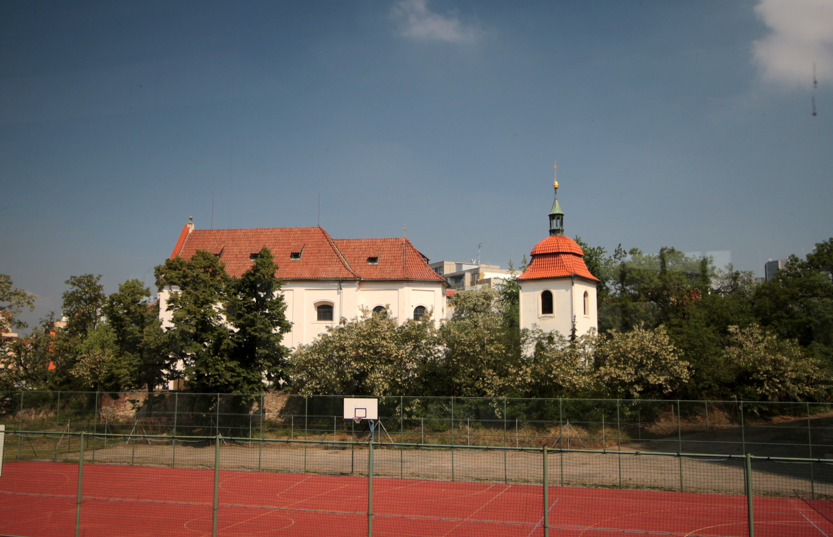 Pankrác, kostel sv. Pankráce